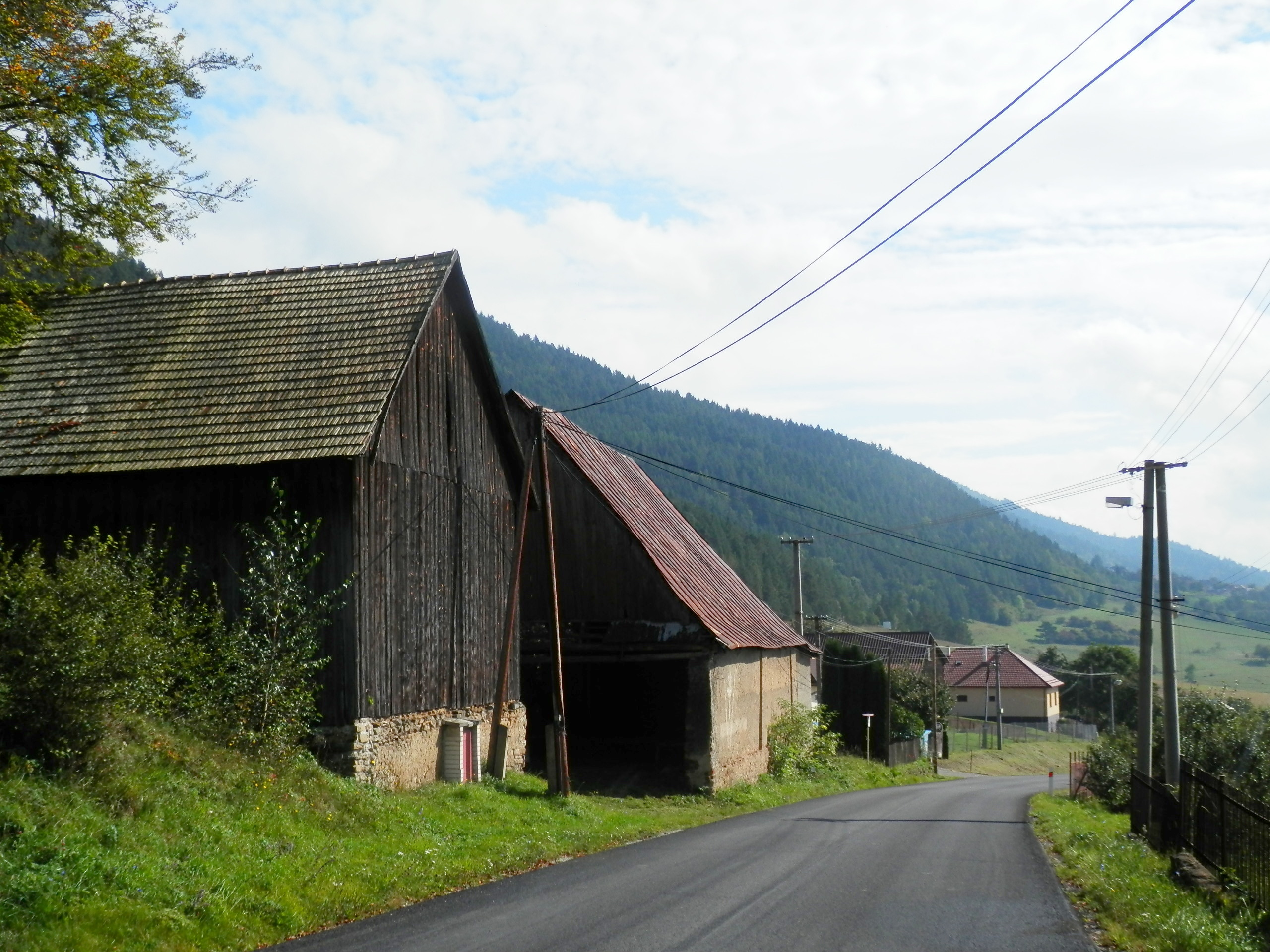 Obec Harakovce, okres Levoča.